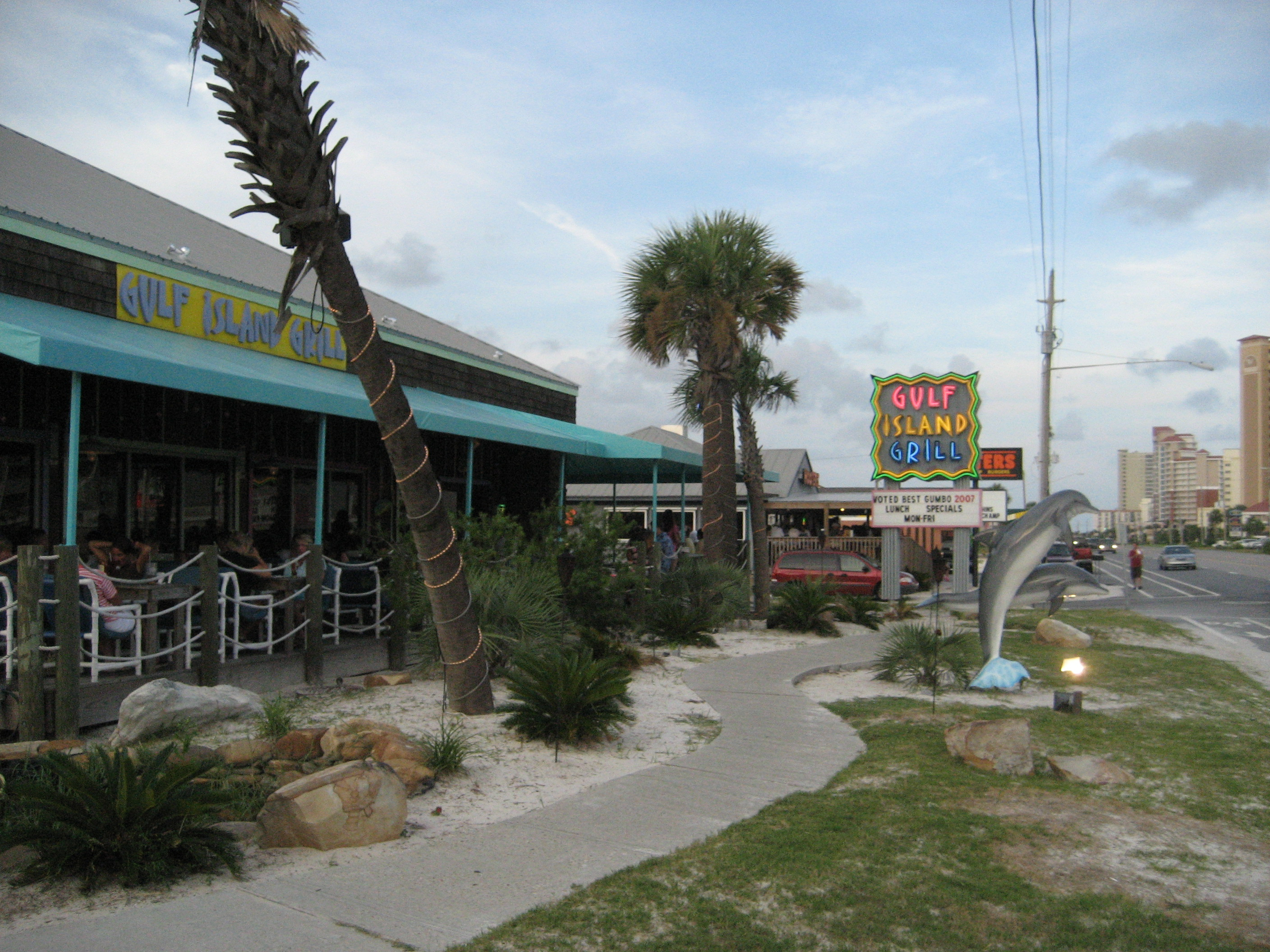 Gulf Shores, Alabama. Restaurant.